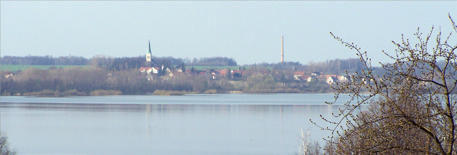 Quatitz und Großdubrau vom Bautzner Stausee betrachtet